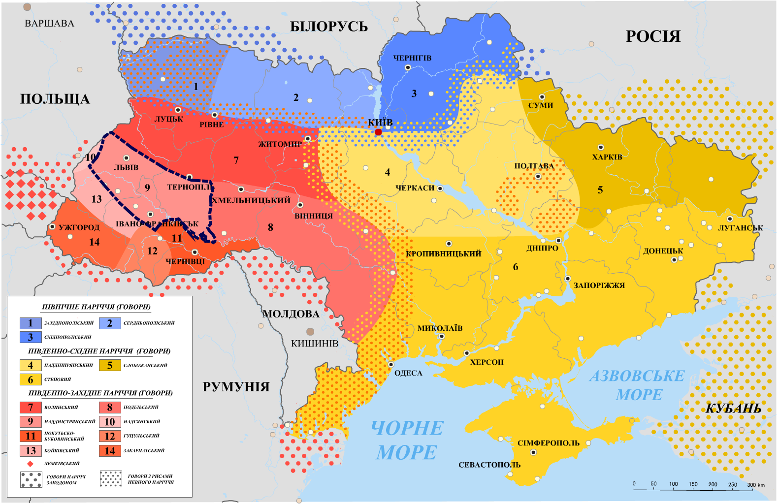 Карта розташування наддністрянського говору